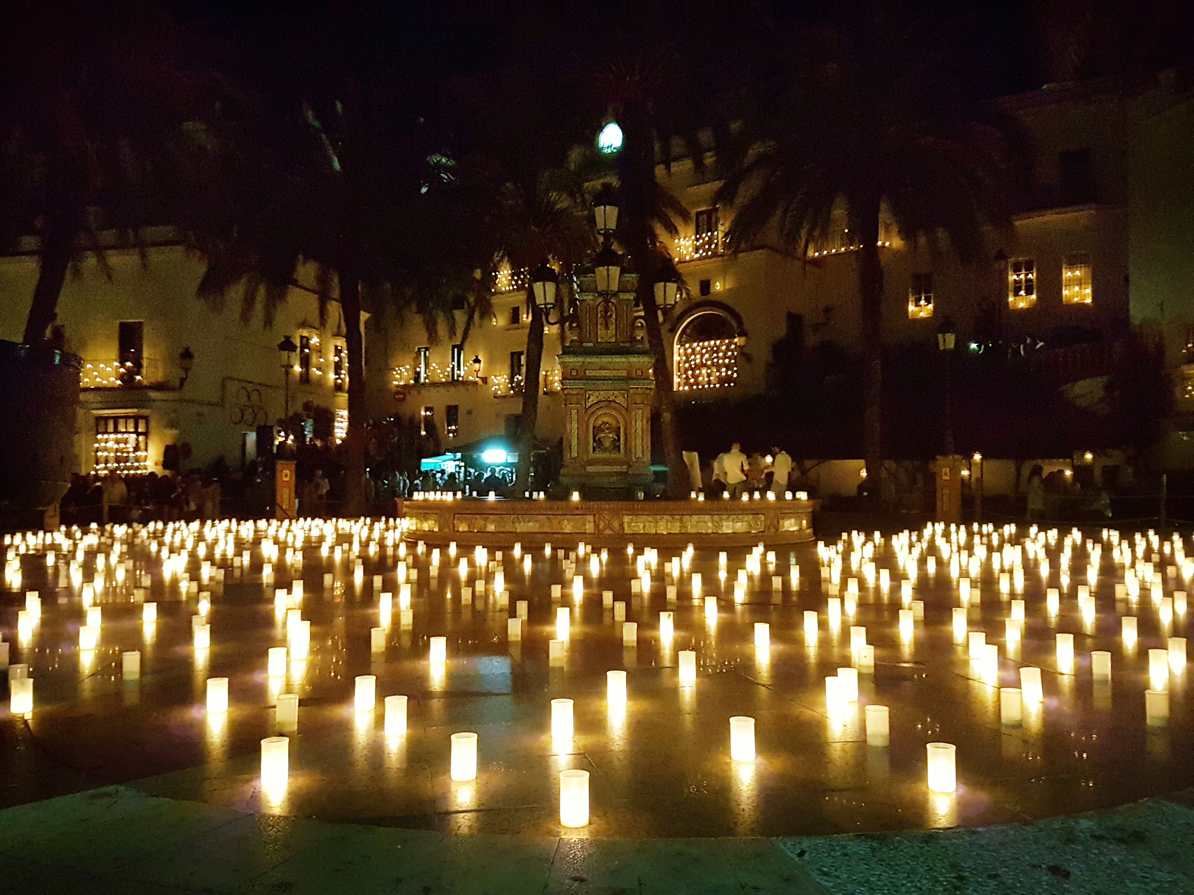 Fiesta de la Noche de las Velas en Vejer de la Frontera